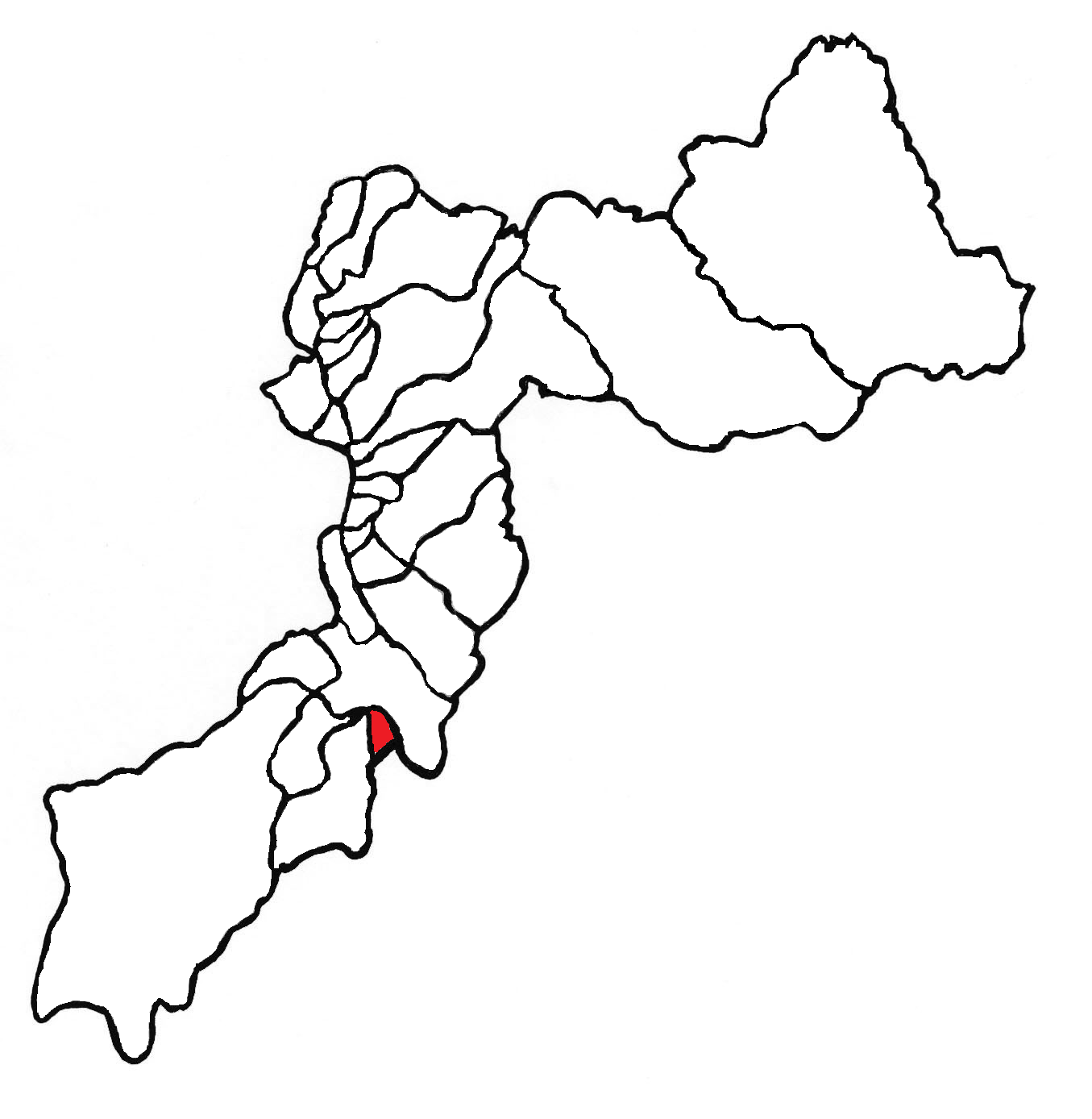 Ubicación del distrito en la provincia de Huancayo, departamento de Junín, Perú